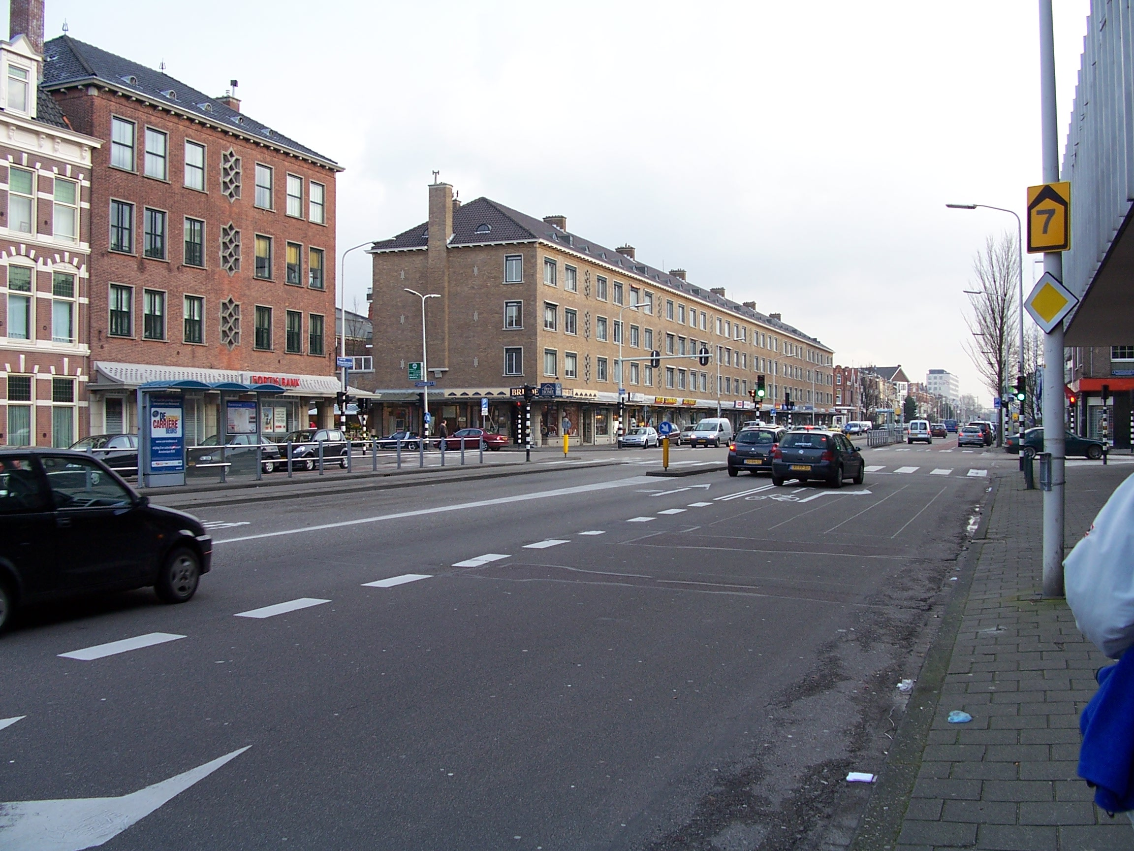 Laan van Nieuw Oost-Indië, a street in The Hague